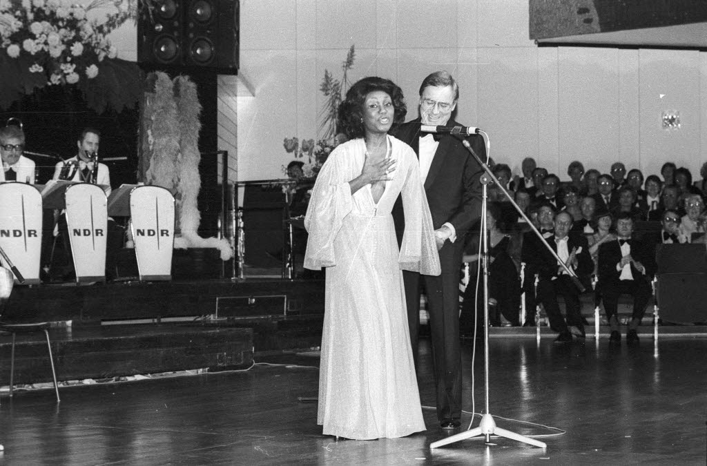 Journalist Werner Baecker (Bildmitte rechts) als Moderator und die amerikanische Opernsängerin Felicia Weathers (Bildmitte links).